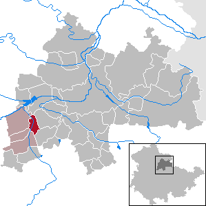 Ringleben in Thuringia - District Sömmerda